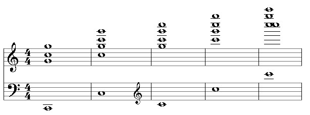 Schema einer repitierenden Mixtur (Orgel).